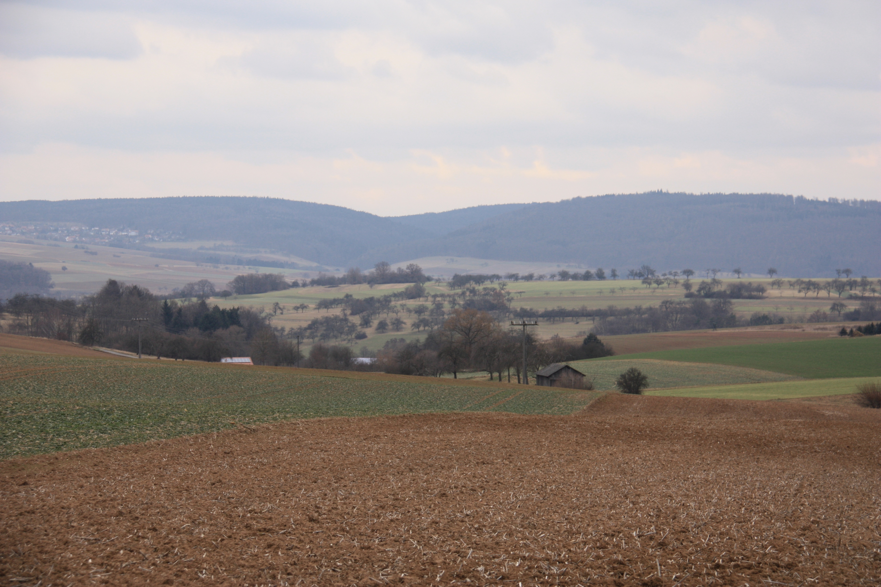 Die Landschaft bei Mönchberg, im Hintergrund links Erlenbach-Streit